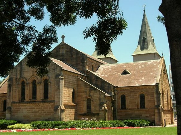 St Johns, Parramatta, Sydney